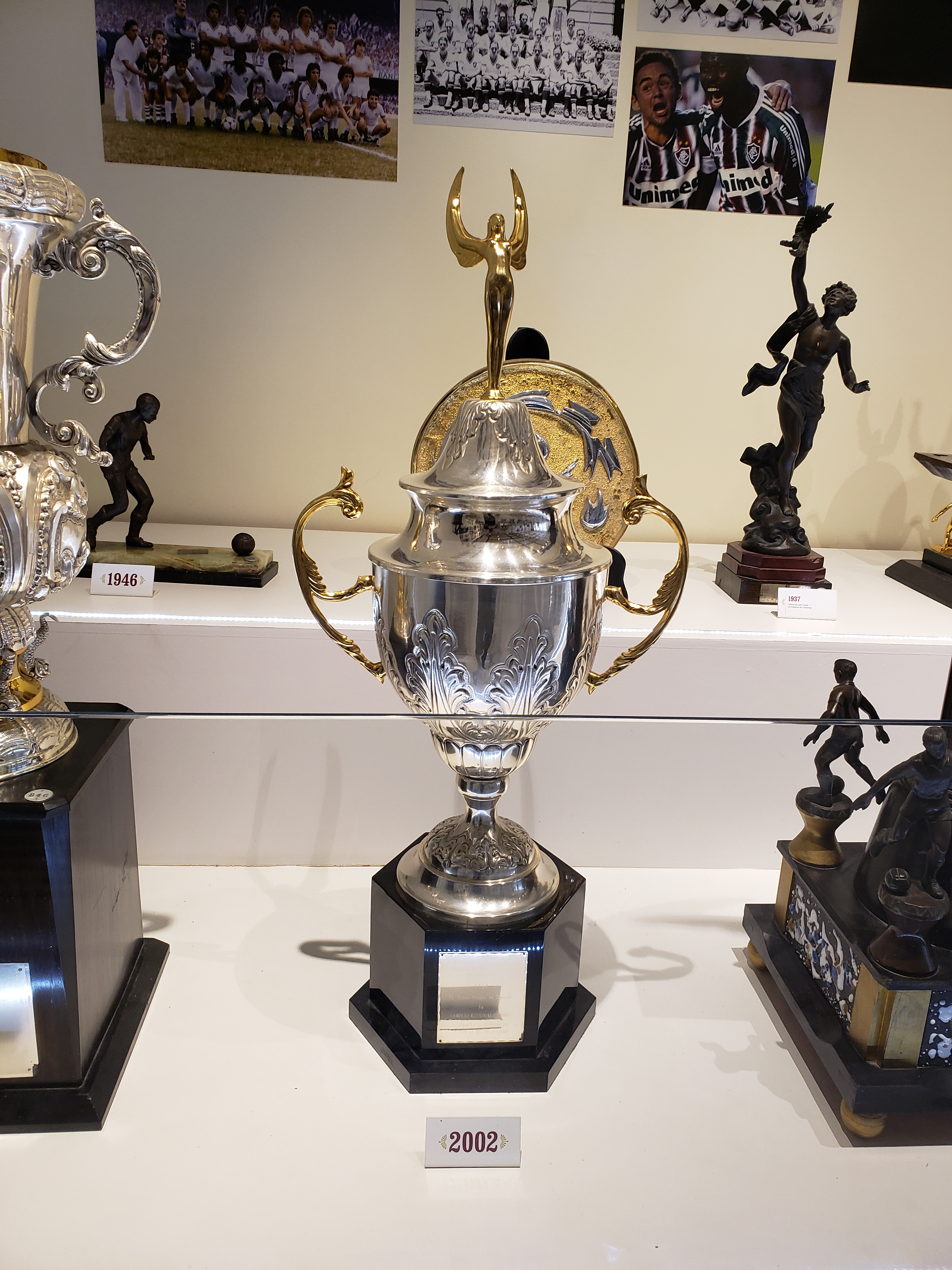 Taça do Campeonato Carioca de Futebol de 2002 conquistada pelo Fluminense Football Club.